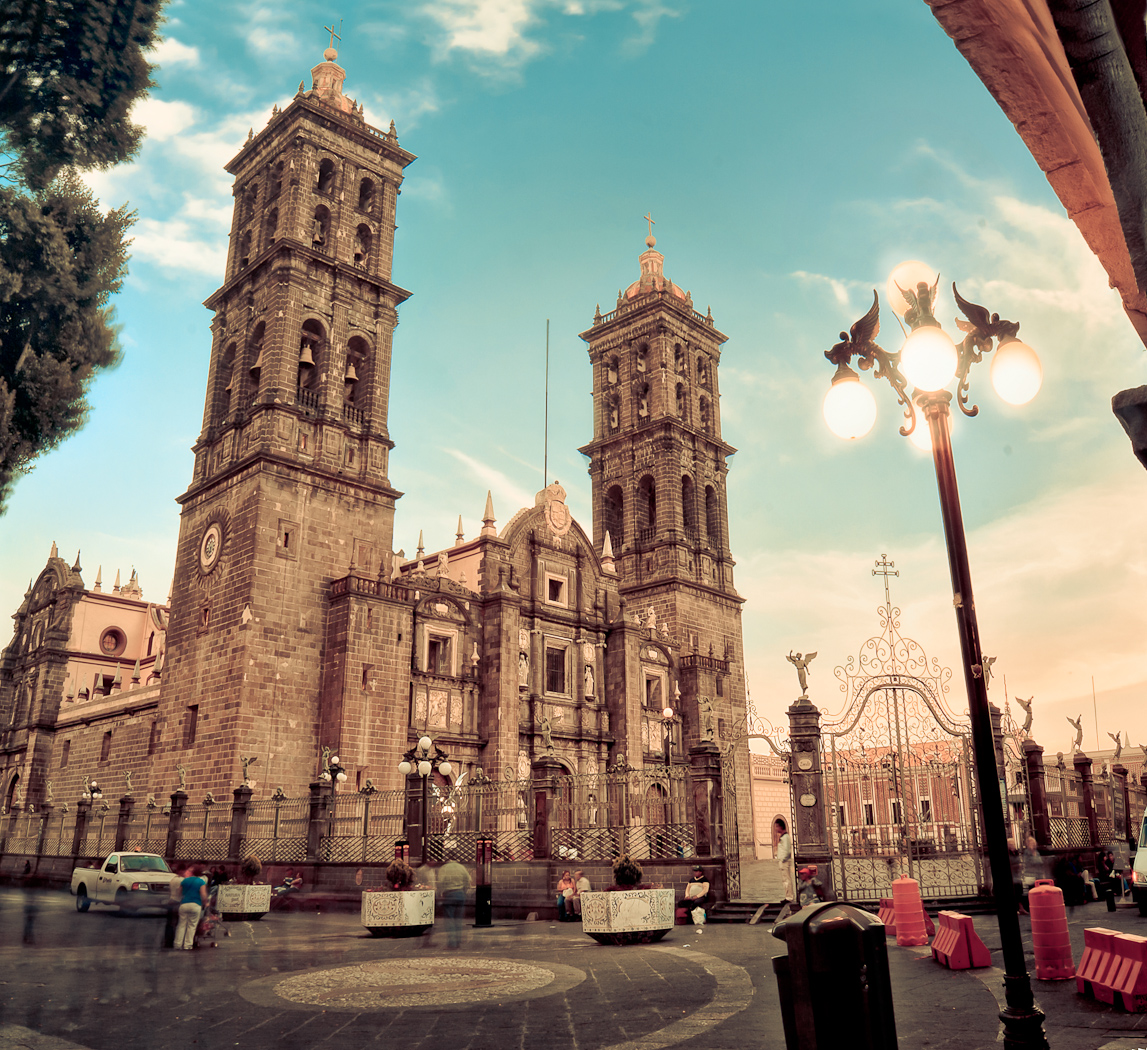 Atardece con la catedral